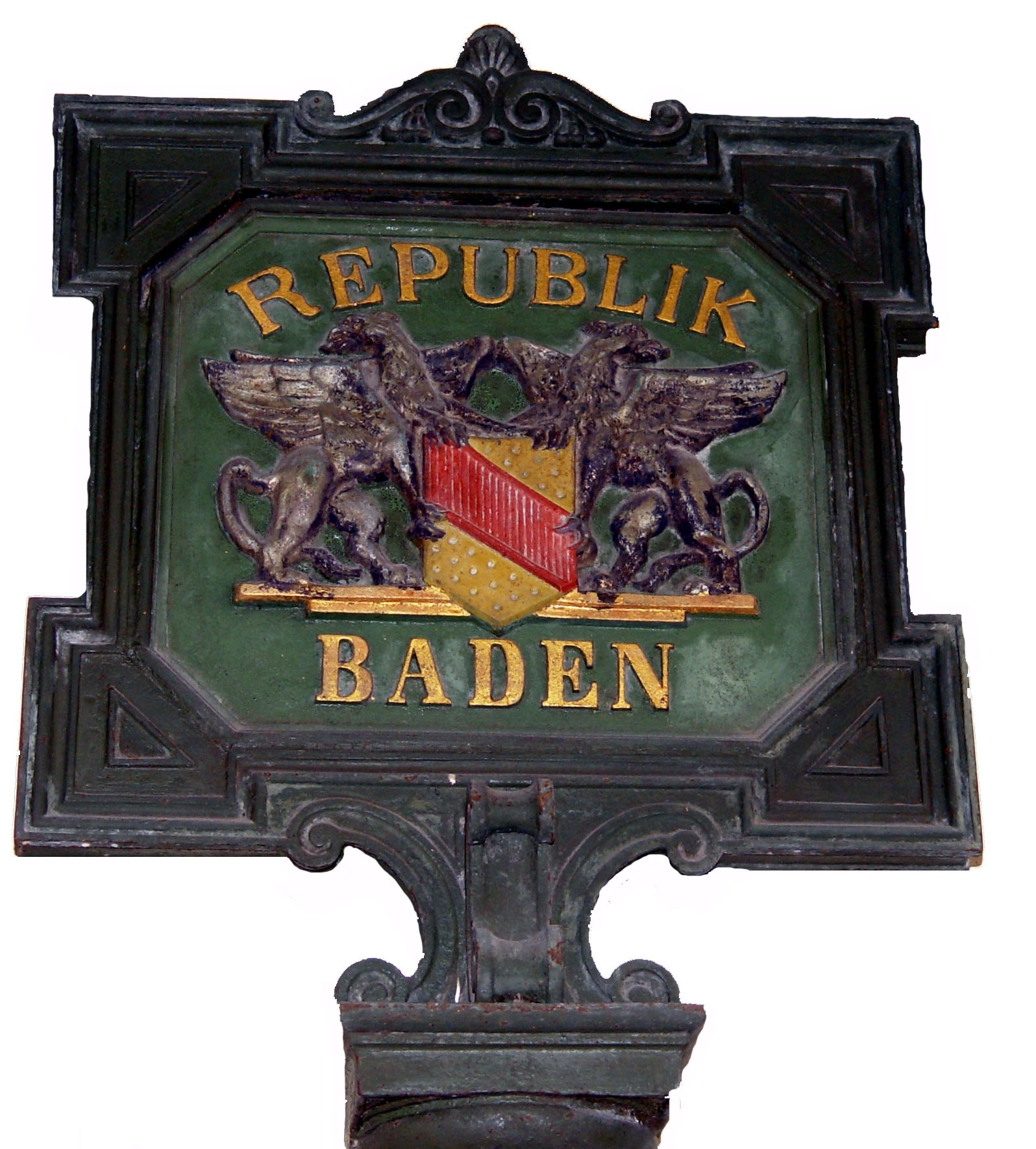 Tafel "Republik Baden", fotografiert am Eingang des Stadtmuseums Rastatt